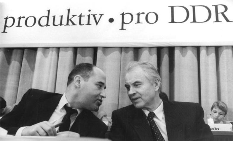 ADN-ZB Zimmermann-24.2.90 Berlin: Als Wahlparteitag zu den Volkskammerwahlen hat der 1. Parteitag der PDS begonnen. Der zweitägige Kongreß soll ein neues Programm und ein überarbeitetes Parteistatut verabschieden, über das Auftreten der PDS zu den Wahlen und ihr Programm befinden sowie Nachwahlen für Parteivorstand und Schiedskommission vornehmen. Im Gespräch: Parteivorsitzender Gregor Gysi (l.) und Dr. Hans Moldrow, Ministerpräsident der DDR.